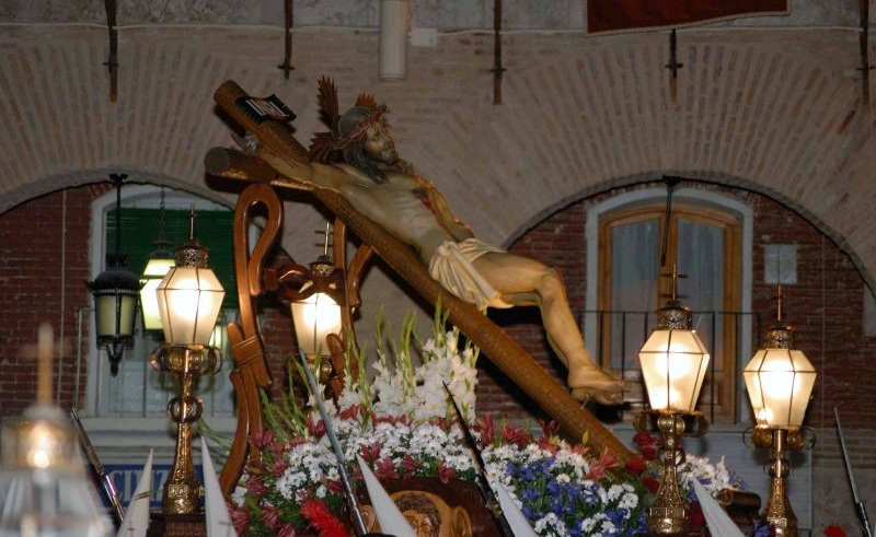 Imagen de Cristo Rey de los Mártires de Ocaña (Toledo)